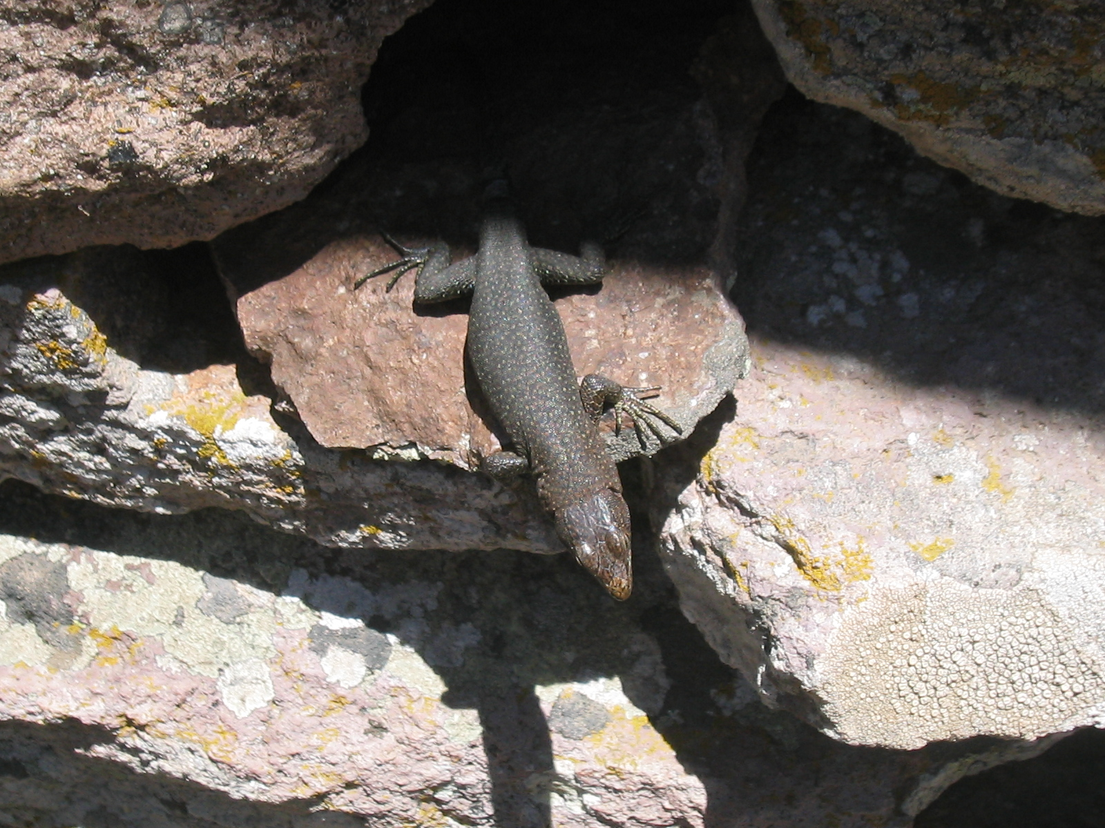 Bortigali. Monte Santu Padre. Lucertola di Bedriaga (raro endemismo sardo-corso)